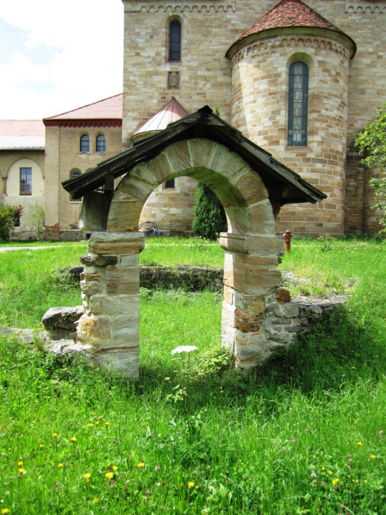 Ehemaliger Karner hinter Stift Seckau